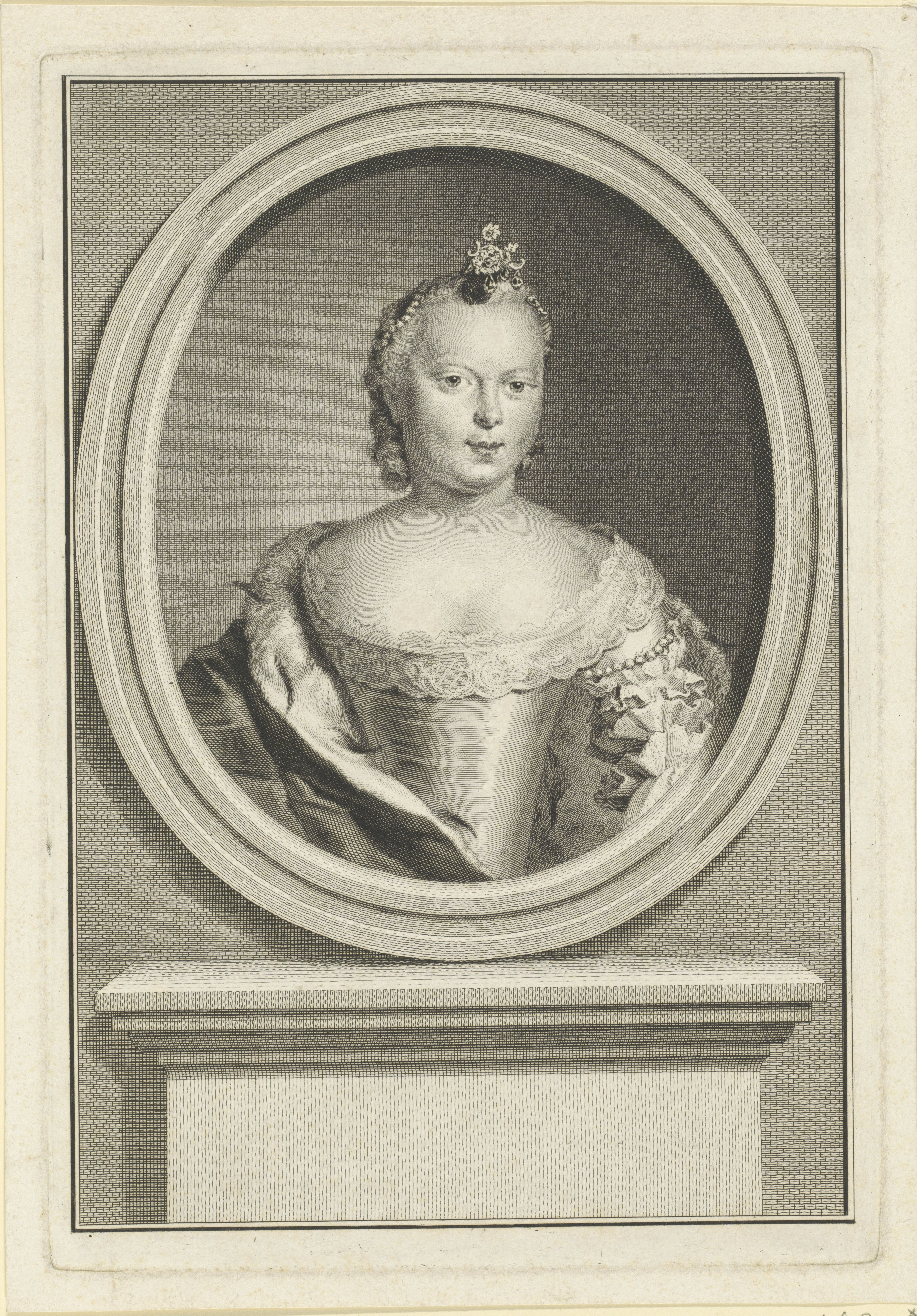 IdentificatieTitel(s): Portret van Carolina, prinses van Oranje-NassauObjecttype: prent Objectnummer: RP-P-1908-138Catalogusreferentie: Van Someren 872*-?Opschriften / Merken: verzamelaarsmerk, verso midden, gestempeld: Lugt 2228Omschrijving: Portret van Carolina in een ovaal.VervaardigingVervaardiger: prentmaker: Jacob HoubrakenPlaats vervaardiging: AmsterdamDatering: 1750 - 1780Fysieke kenmerken: gravure en ets; proefdrukMateriaal: papier Techniek: graveren (drukprocedé) / etsenAfmetingen: plaatrand: h 267 mm × b 183 mmToelichtingDe hier vermelde titel verwijst naar de hoogst verkregen titel van de geportretteerde, niet per se naar de titel die de geportretteerde op deze voorstelling draagt.OnderwerpWie: Carolina (prinses van Oranje-Nassau)Verwerving en rechtenVerwerving: aankoop 1908Copyright: Publiek domein